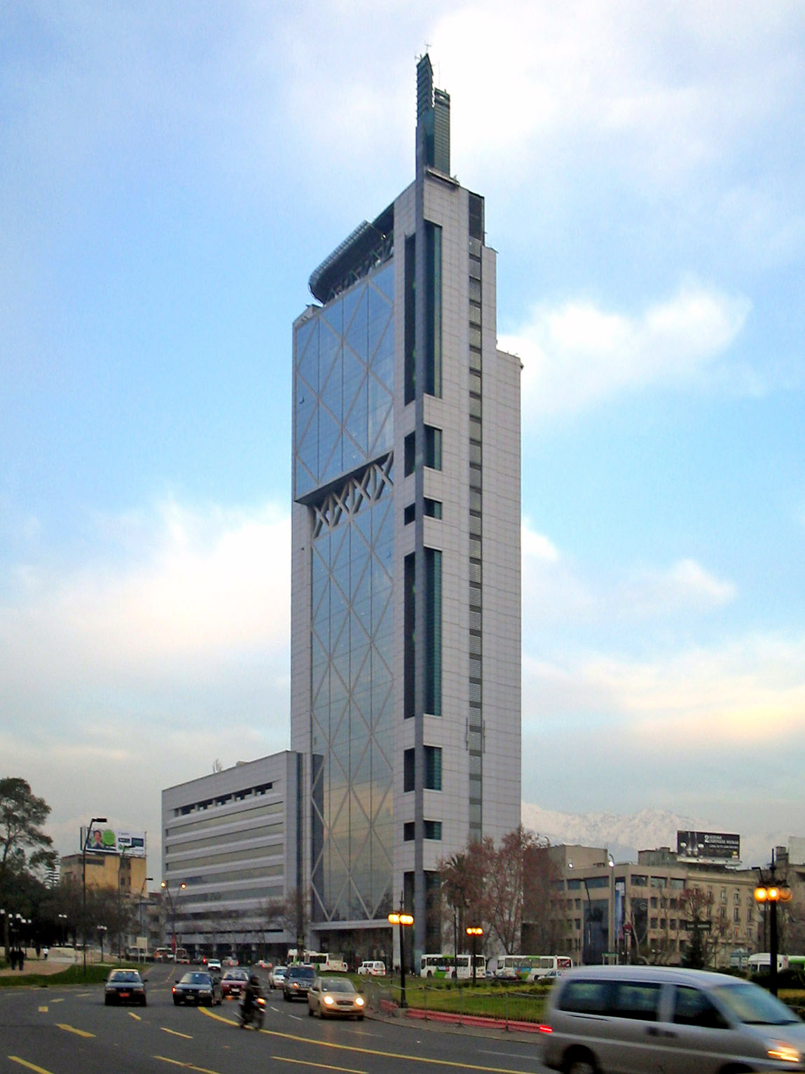 Torre Telefónica, Santiago de Chile